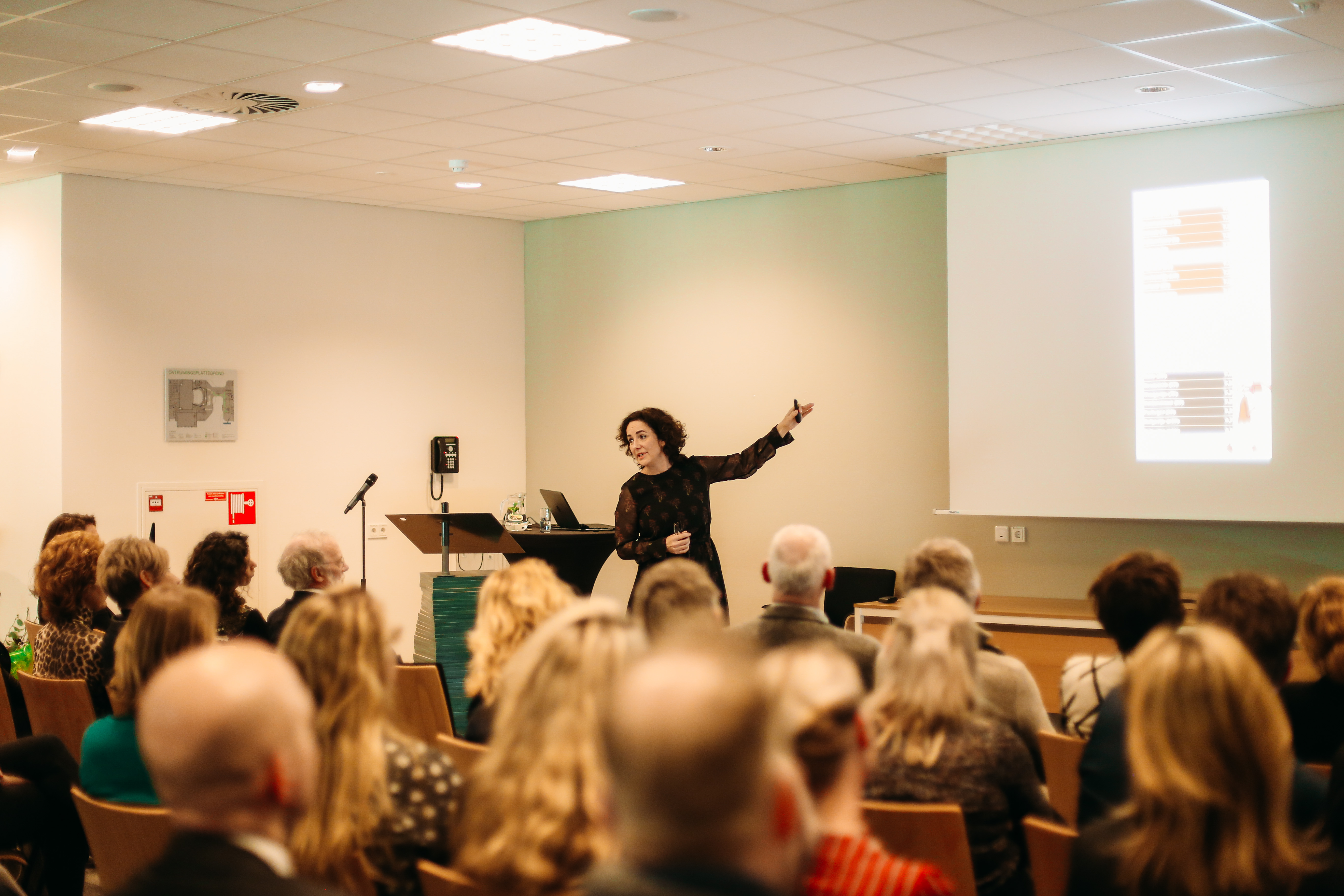 Femke Halsema tijdens een try out van haar theatercollege 'Een Vrij Land' in Emmen in 2018